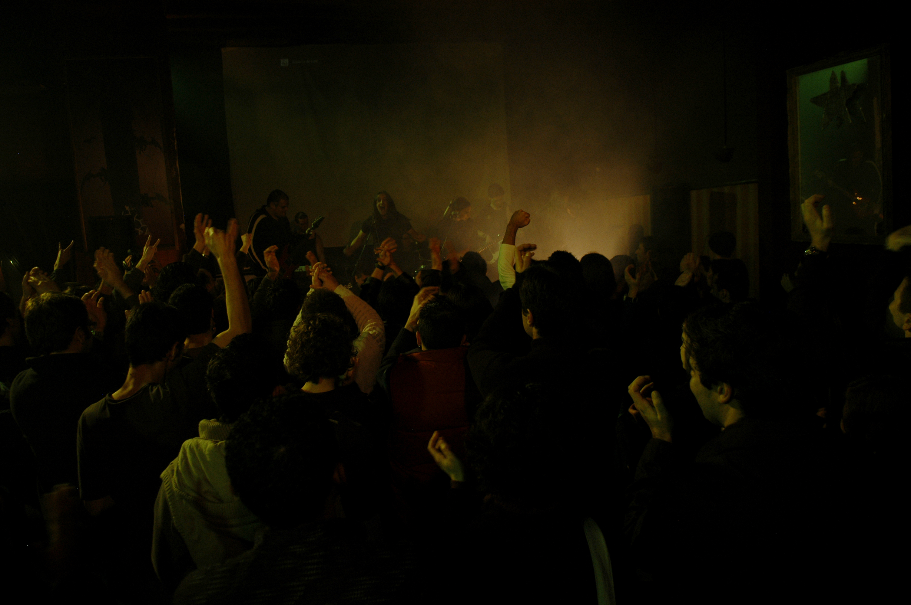 Rock band group performing on stage, spotlit, with row of darkened fans in the foreground